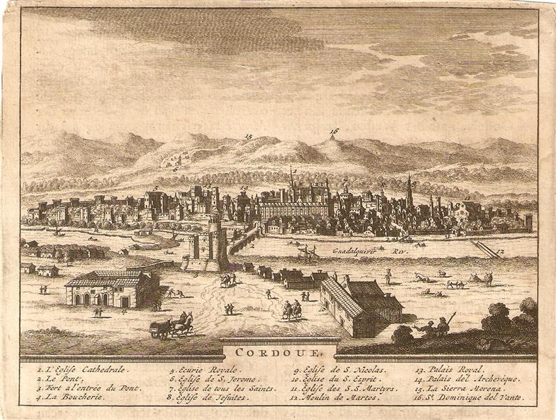 Grabado de la ciudad de Córdoba obra de Pieter van der Aa. Procedente del libro Les delices de L’Espagne et du Portugal (1715).